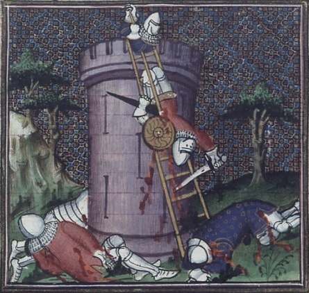 Manlius Capitolinus sauvant le Capitole.